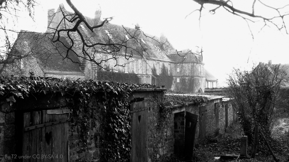 Cabanons abandonnés pour certains et aile ouest de l'abbaye.